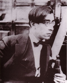 Uruguayan artist Rafael Barradas (1890-1929)